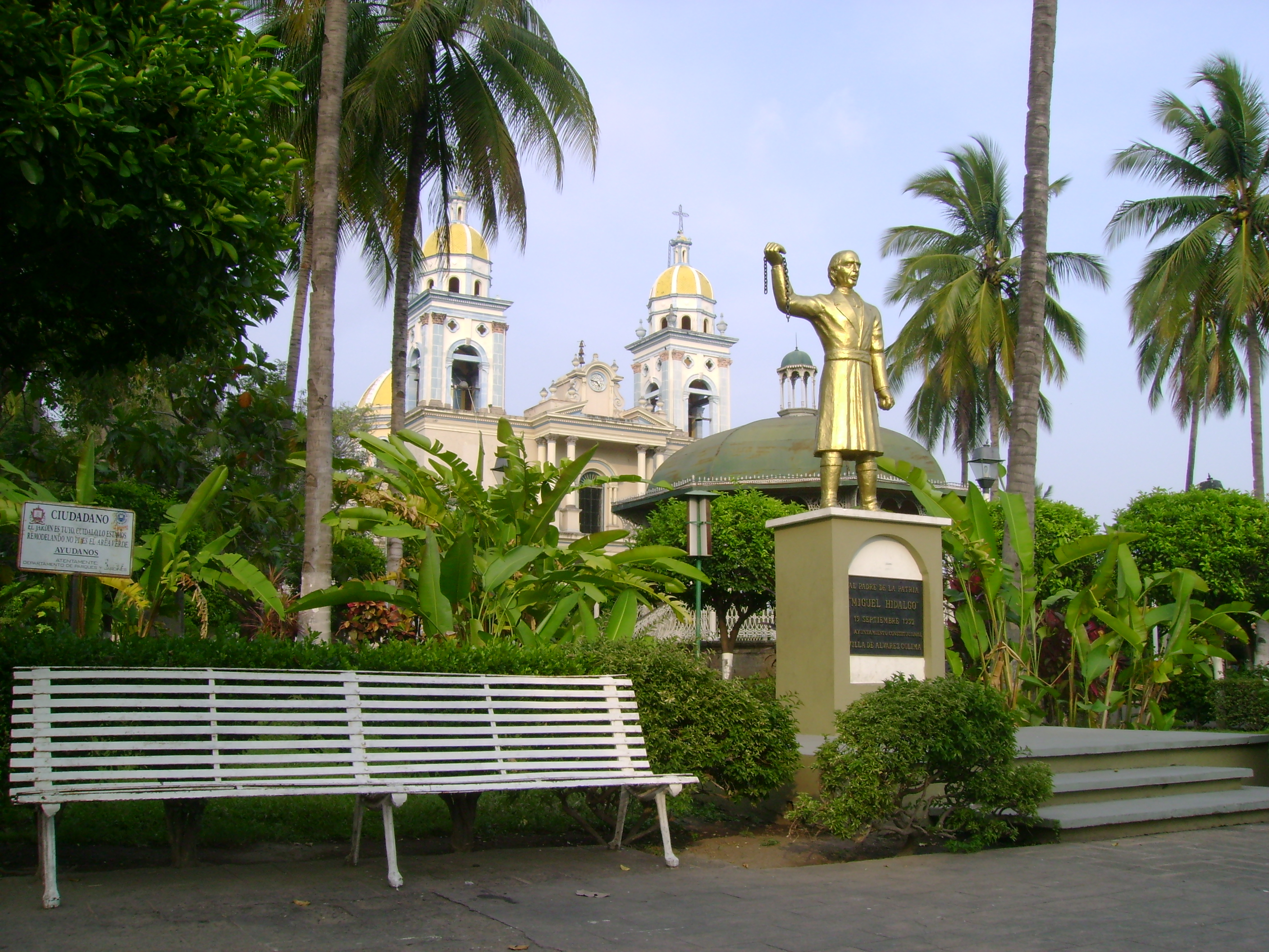 Centro de Villa de Alvarez